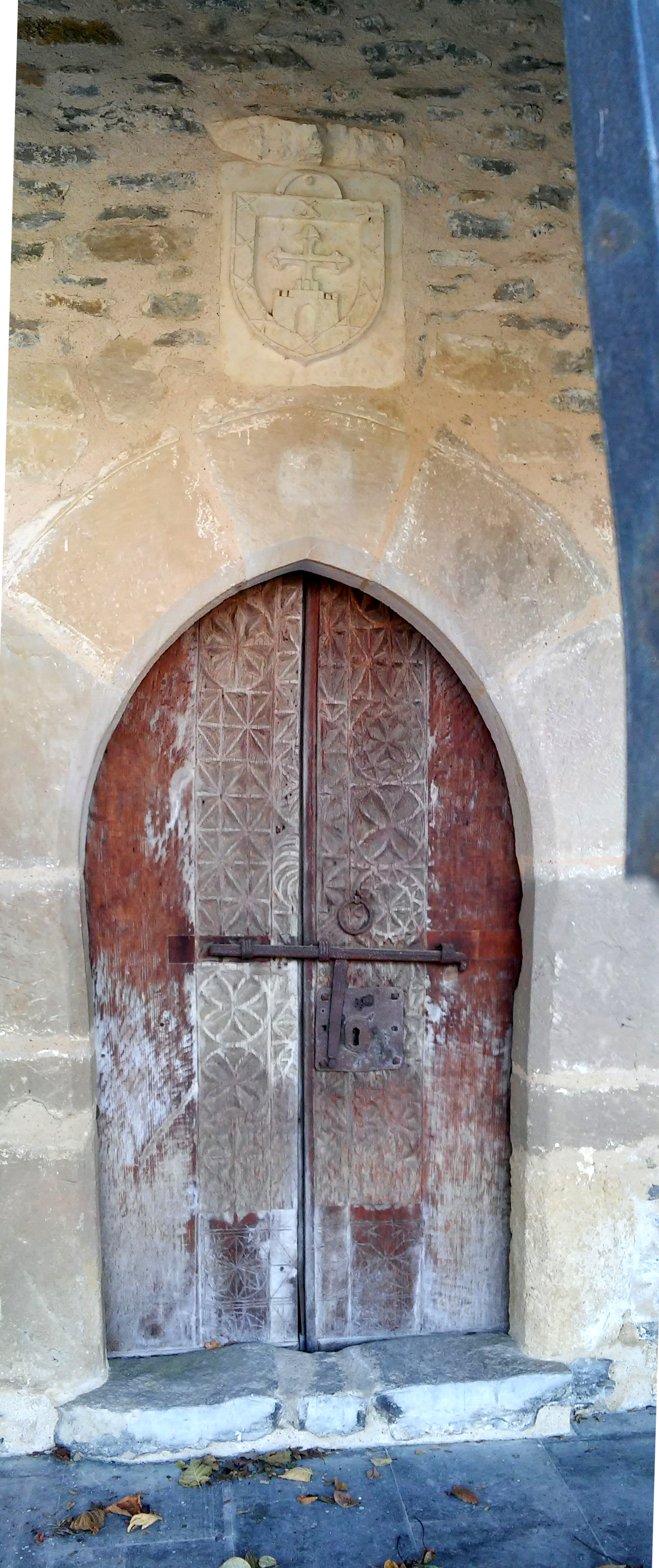 Urbina Basabeko dorrearen ataria eta armarria (Kuartango)